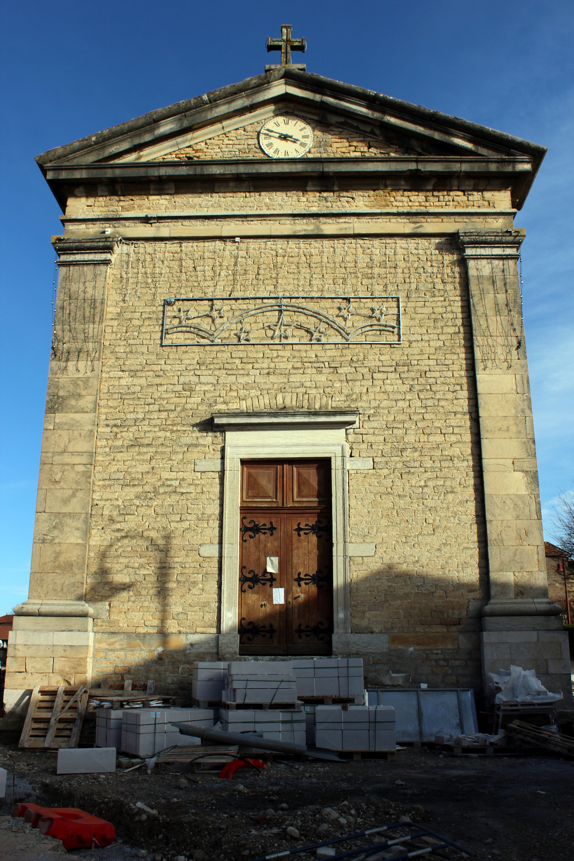 Eglise de Four.